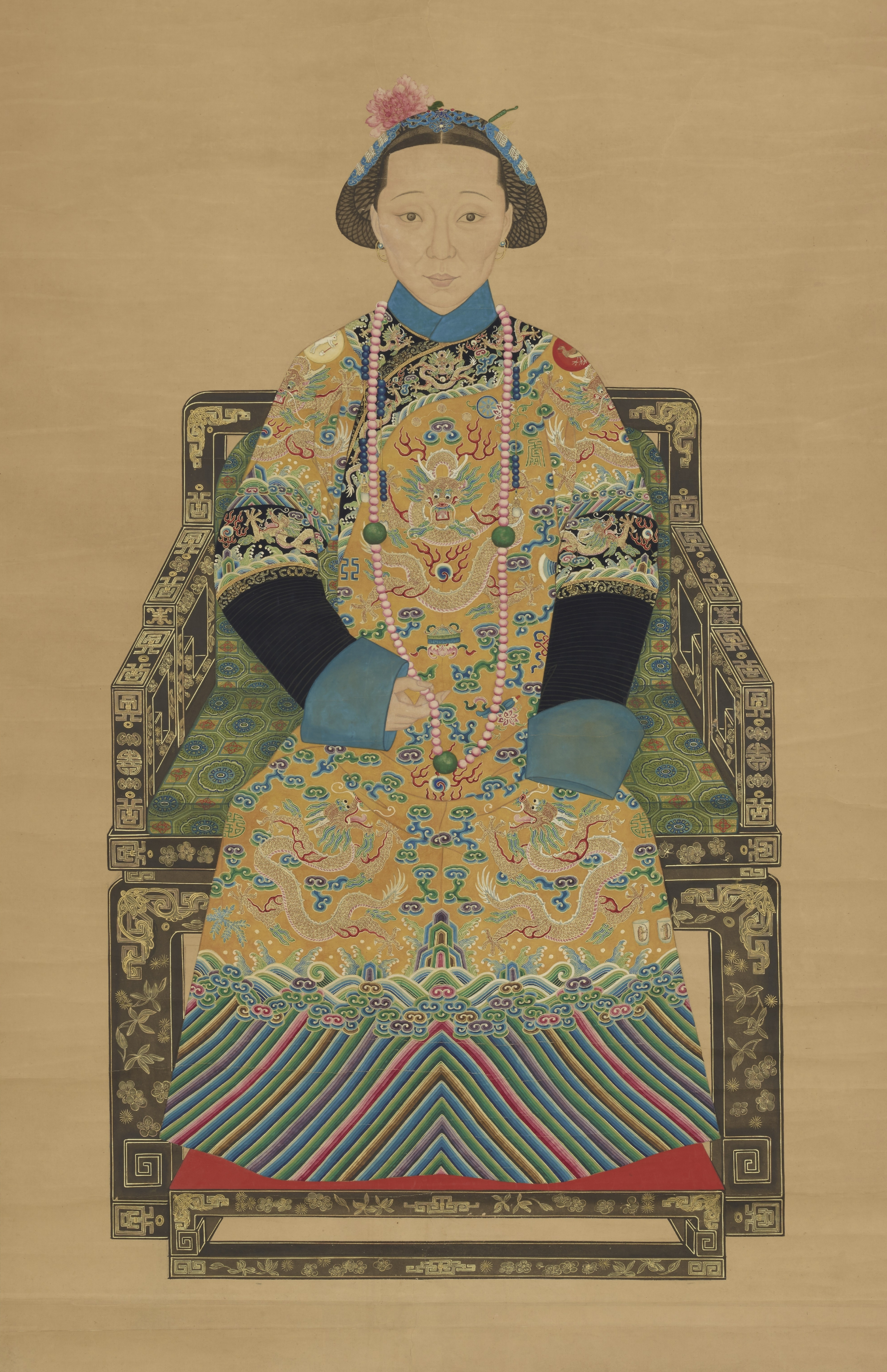 孝貞顯皇后坐像 軸